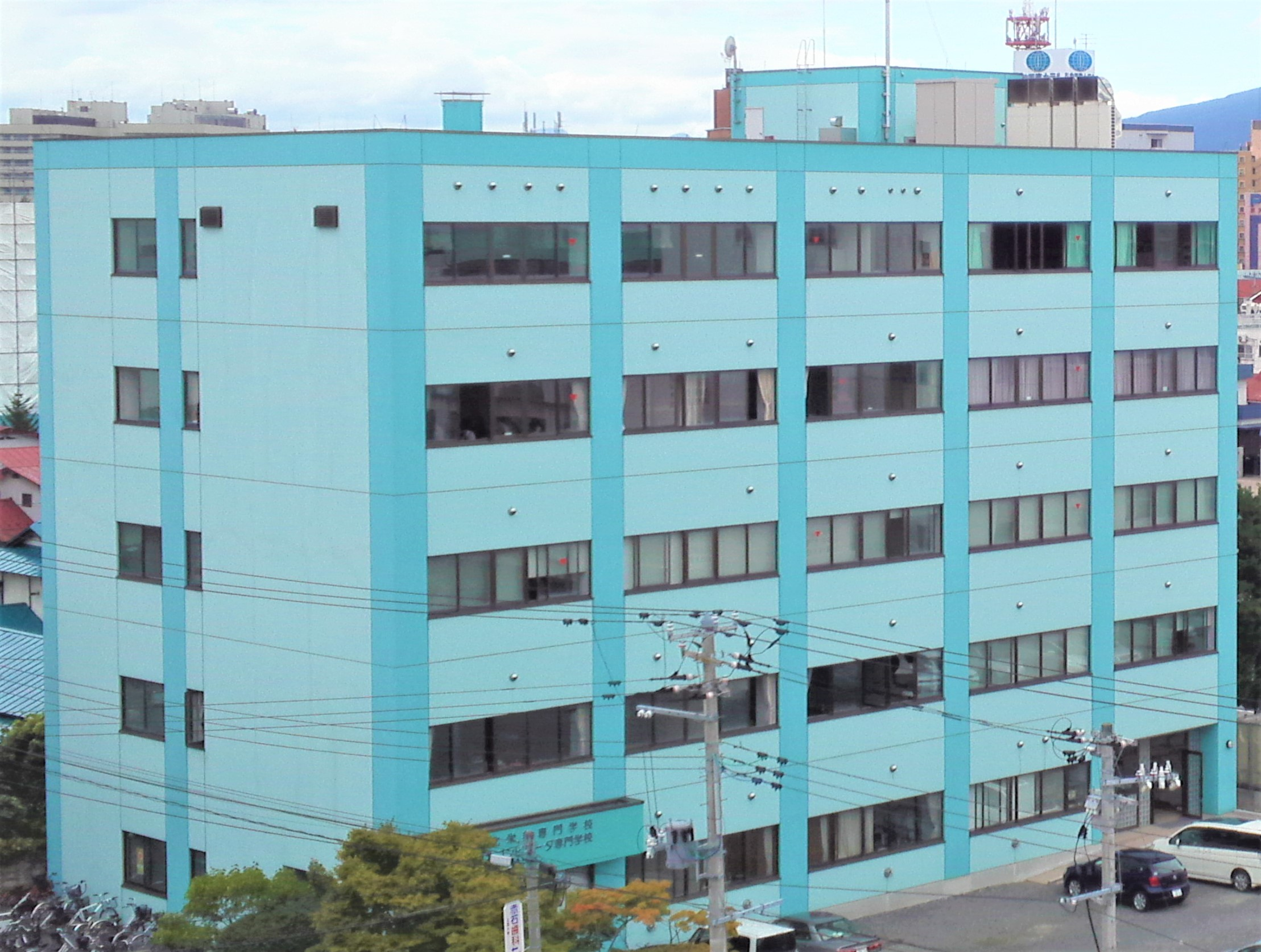 東北栄養専門学校